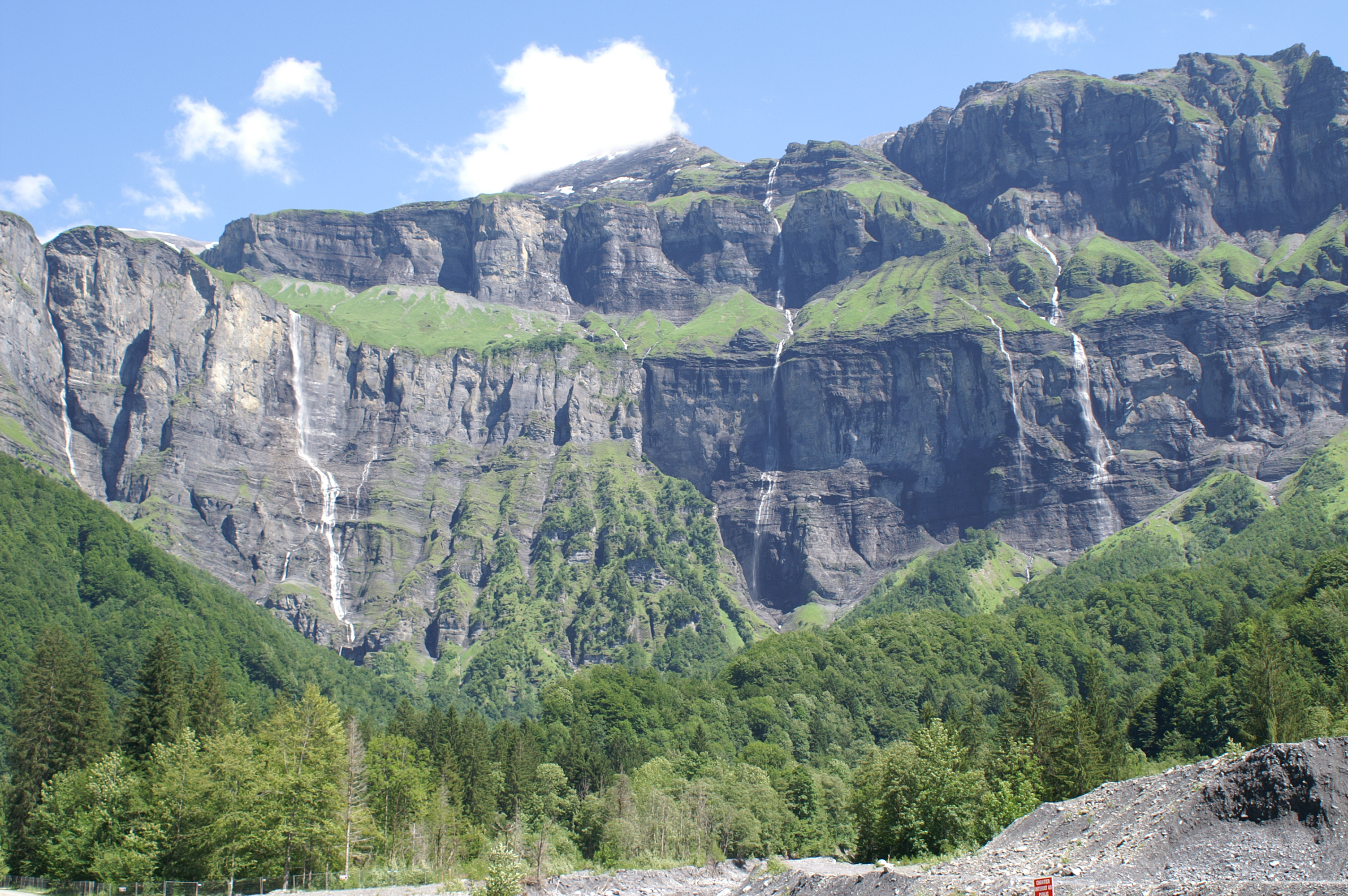 Cirque_du_Fer_à_Cheval (détail)